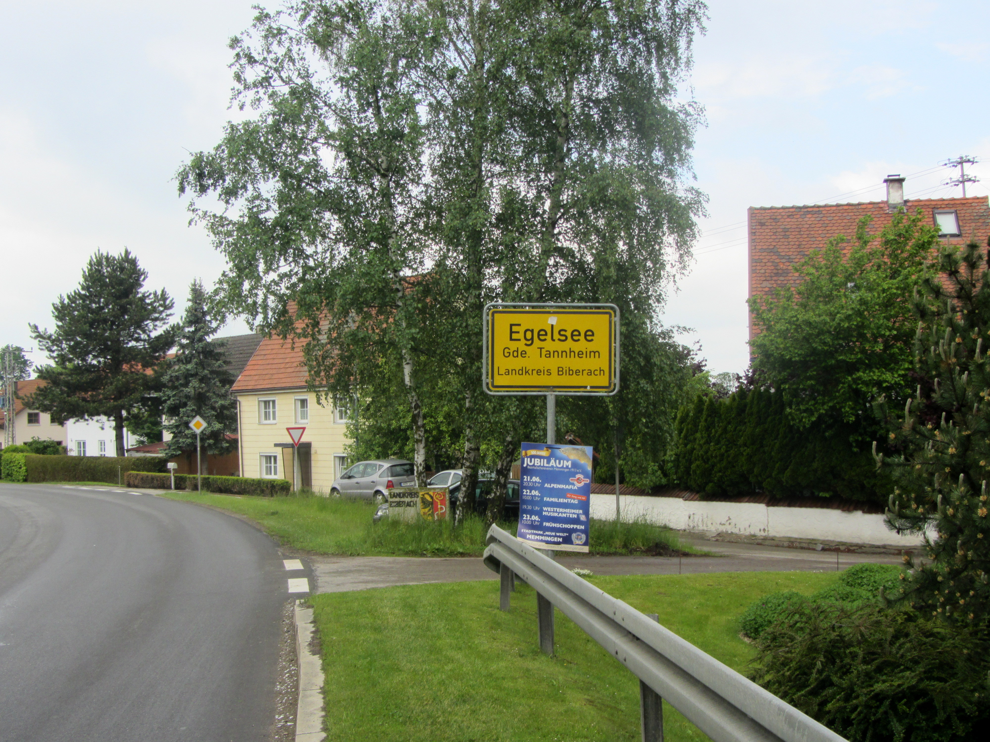 Egelsee